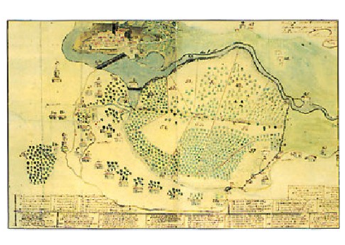 Plentzia eta Urduliz irudikatzen dituen mapa topografikoa, J. Echevarríak 1745ean egina. (Real Chancillería de Valladolid-eko Artxiboa).